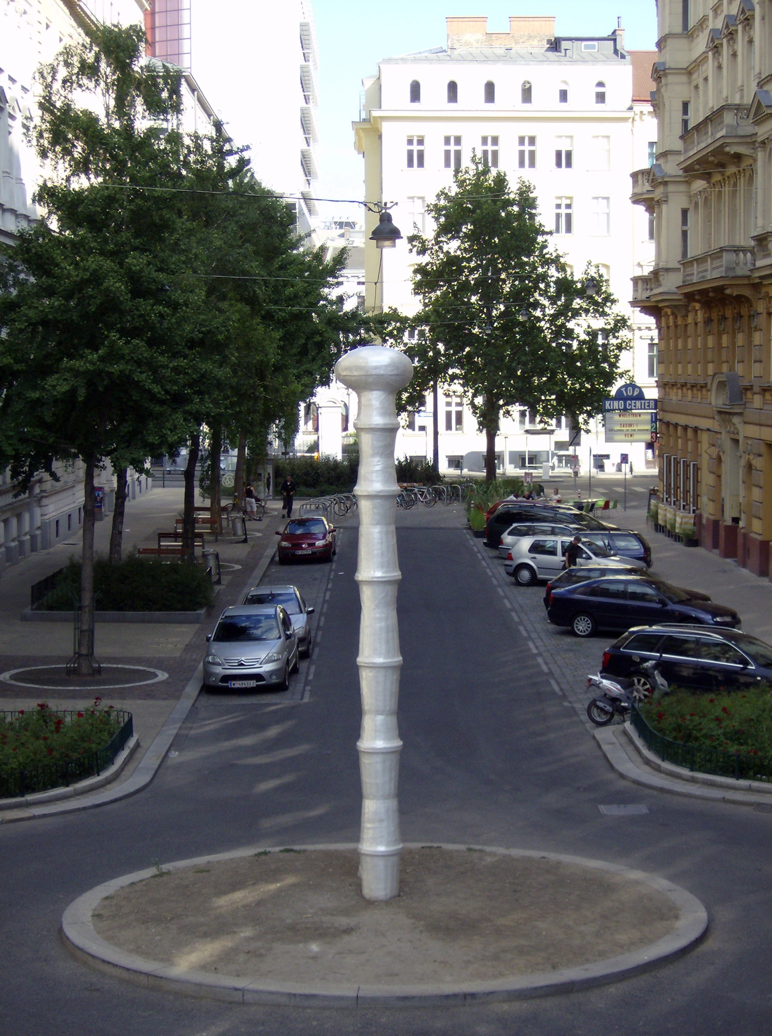 Sculpture by Franz West in Vienna/Austria.